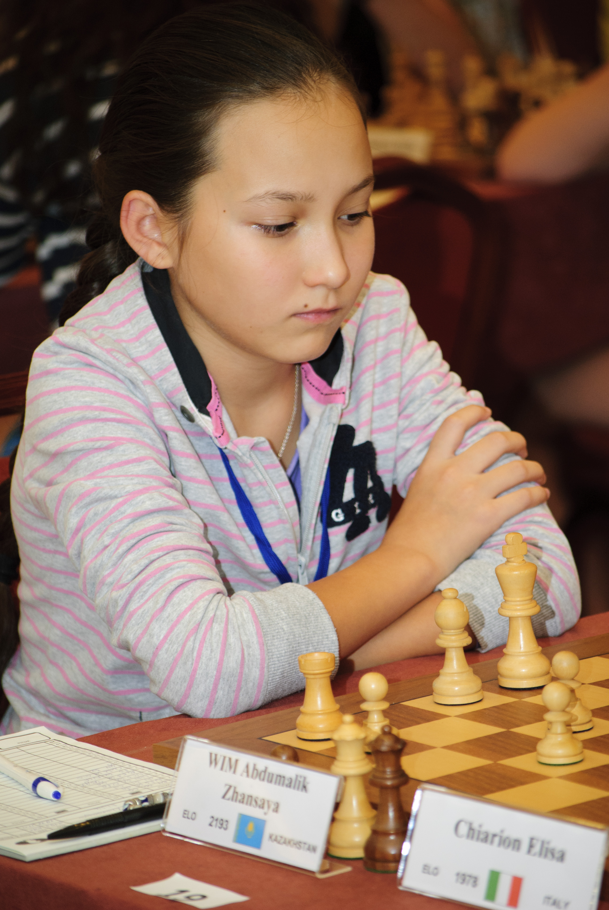 WIM Abdumalik Zhansaya, WChJ Athens 2012